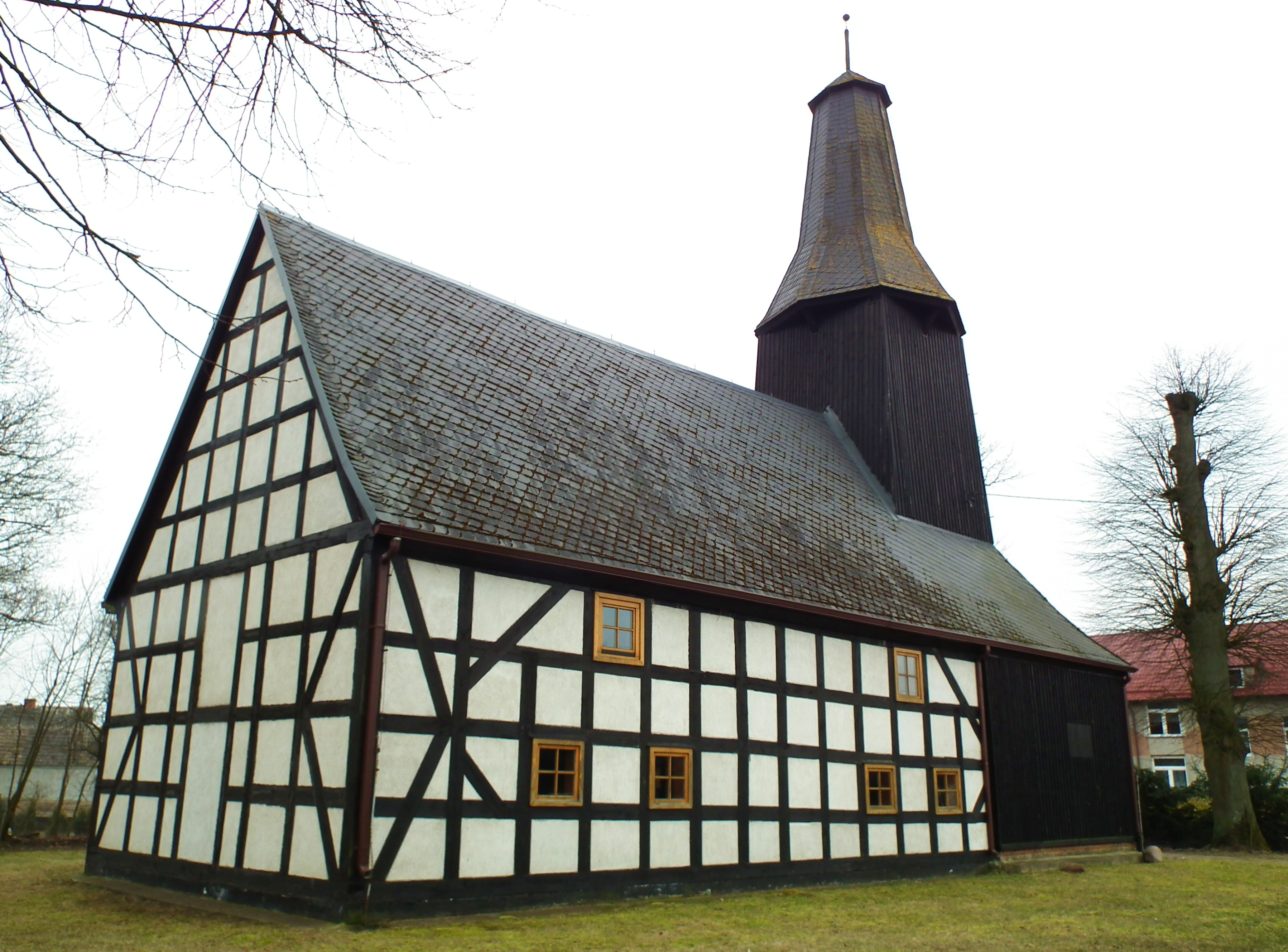 Kościół Chrystusa Króla Wszechświata w Krzemieniewie.